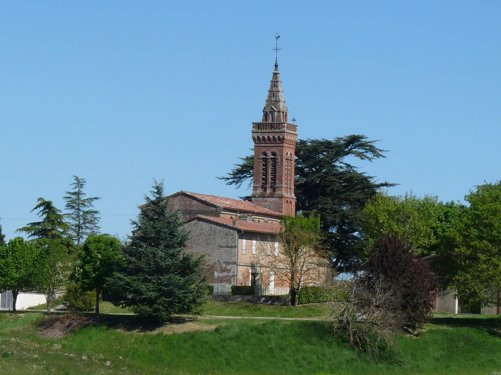 Eglise de Gauré, Haute-Garonne, France